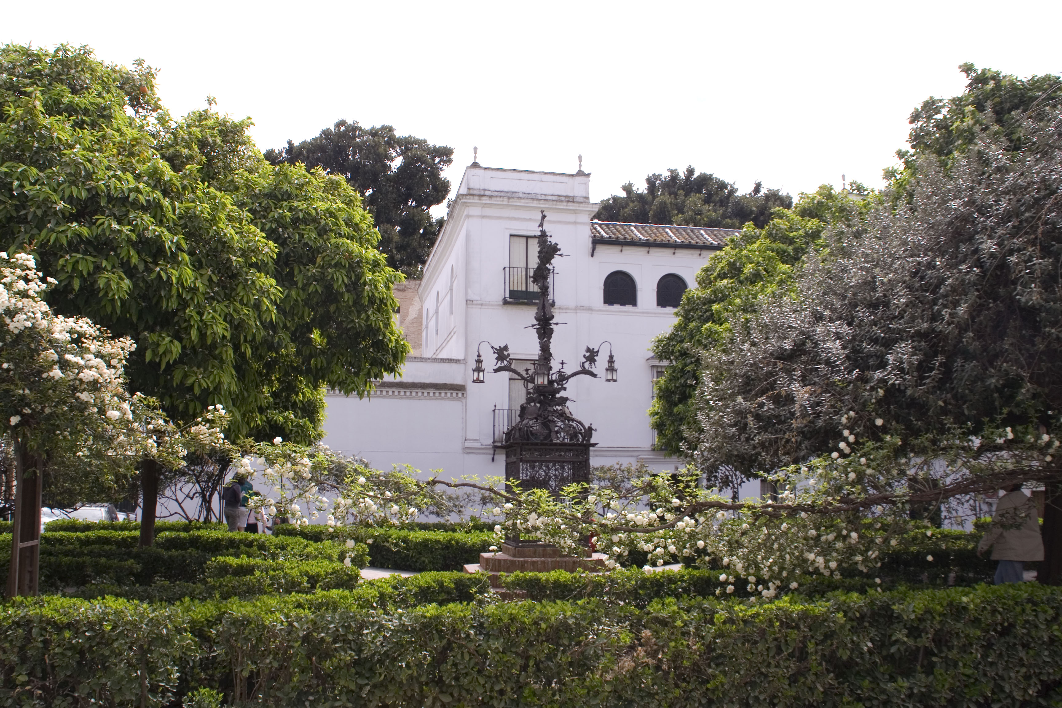 Plaza de Santa Cruz de Sevilla.